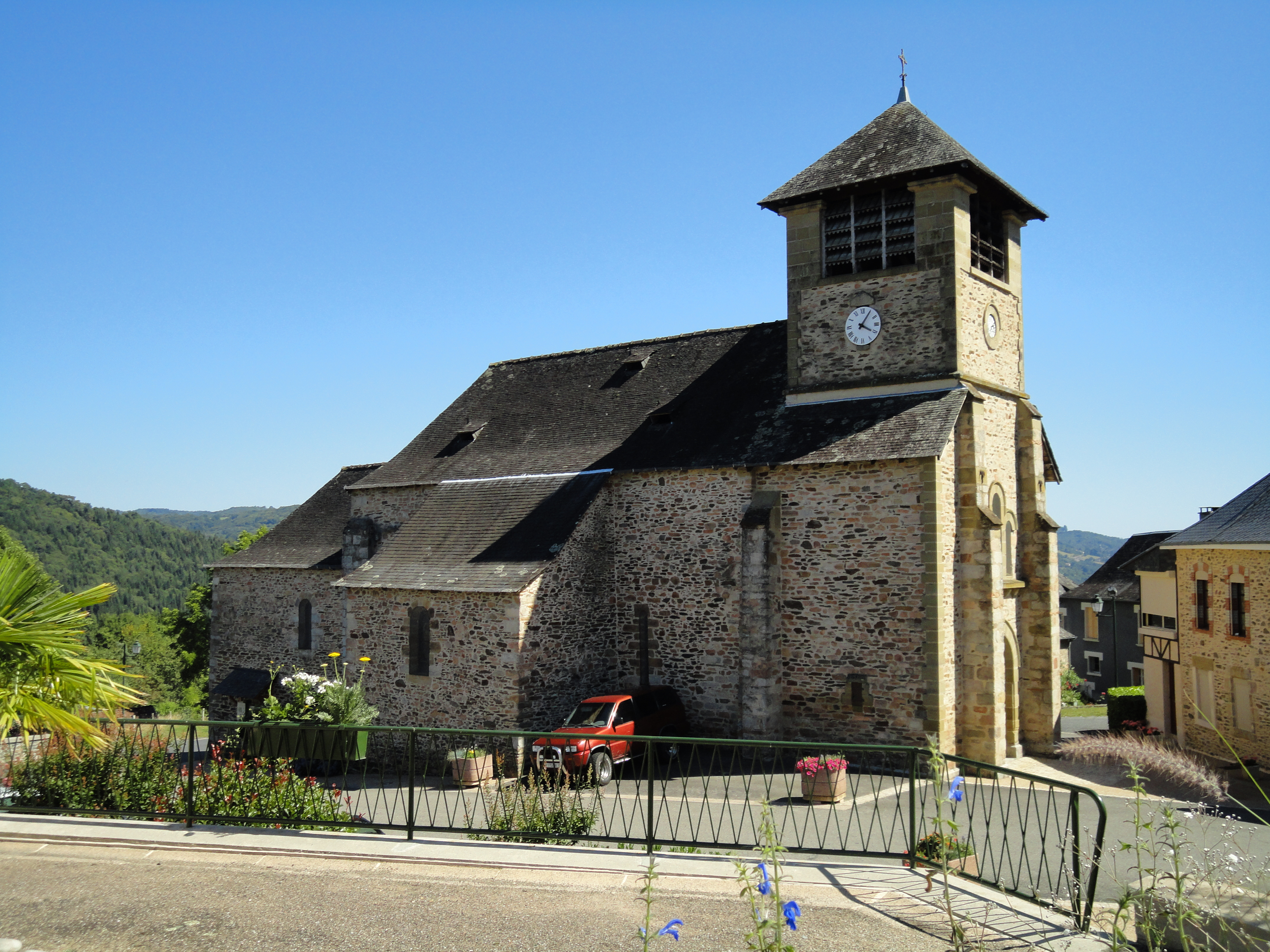 L'église de Saint-Hilaire-Peyroux, Corrèze, France